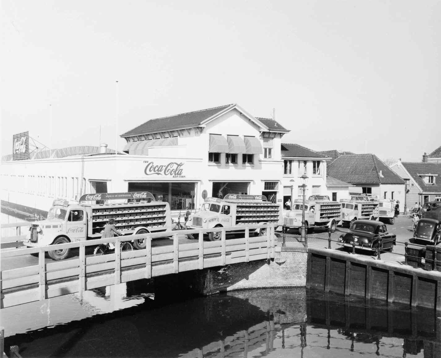 Het wagenpark van de Coca Colafabriek, Velserweg, Amsterdam-Sloterdijk, juli 1952